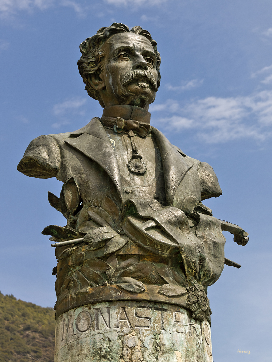 Busto de Jesús de Monasterio, insigne hijo de Potes